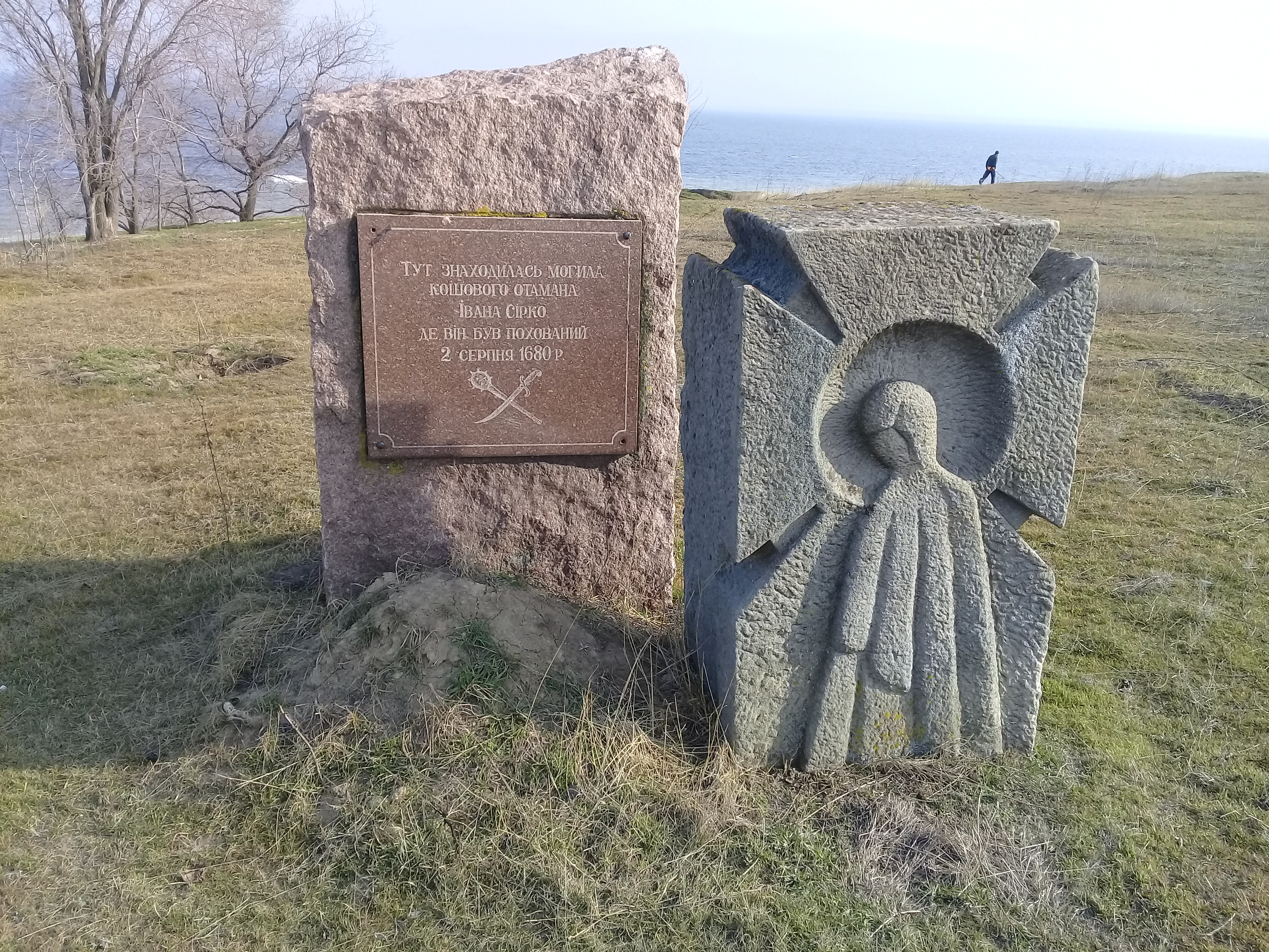 Могила легендарного козака перебувала під селом Капулівка Нікопольського району. Однак, через те, що могила знаходилася на березі Каховського водосховища, існувала загроза руйнування водою та у листопаді 1967 року останки Сірка було перенесено до нової могили, викопаної в підніжжі кургану епохи бронзи.